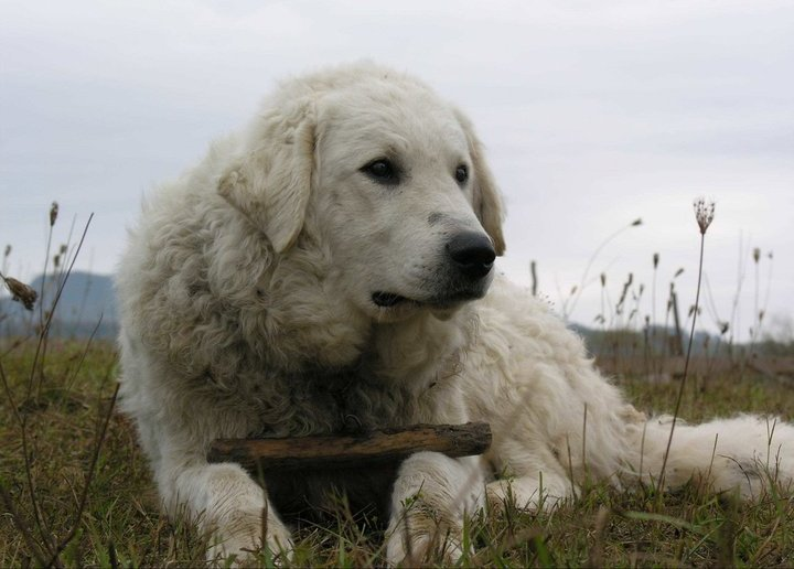 kuvasz kan